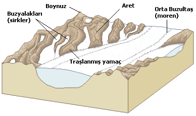 Kaynak:[1]. üzerine Türkçeleştirildi.